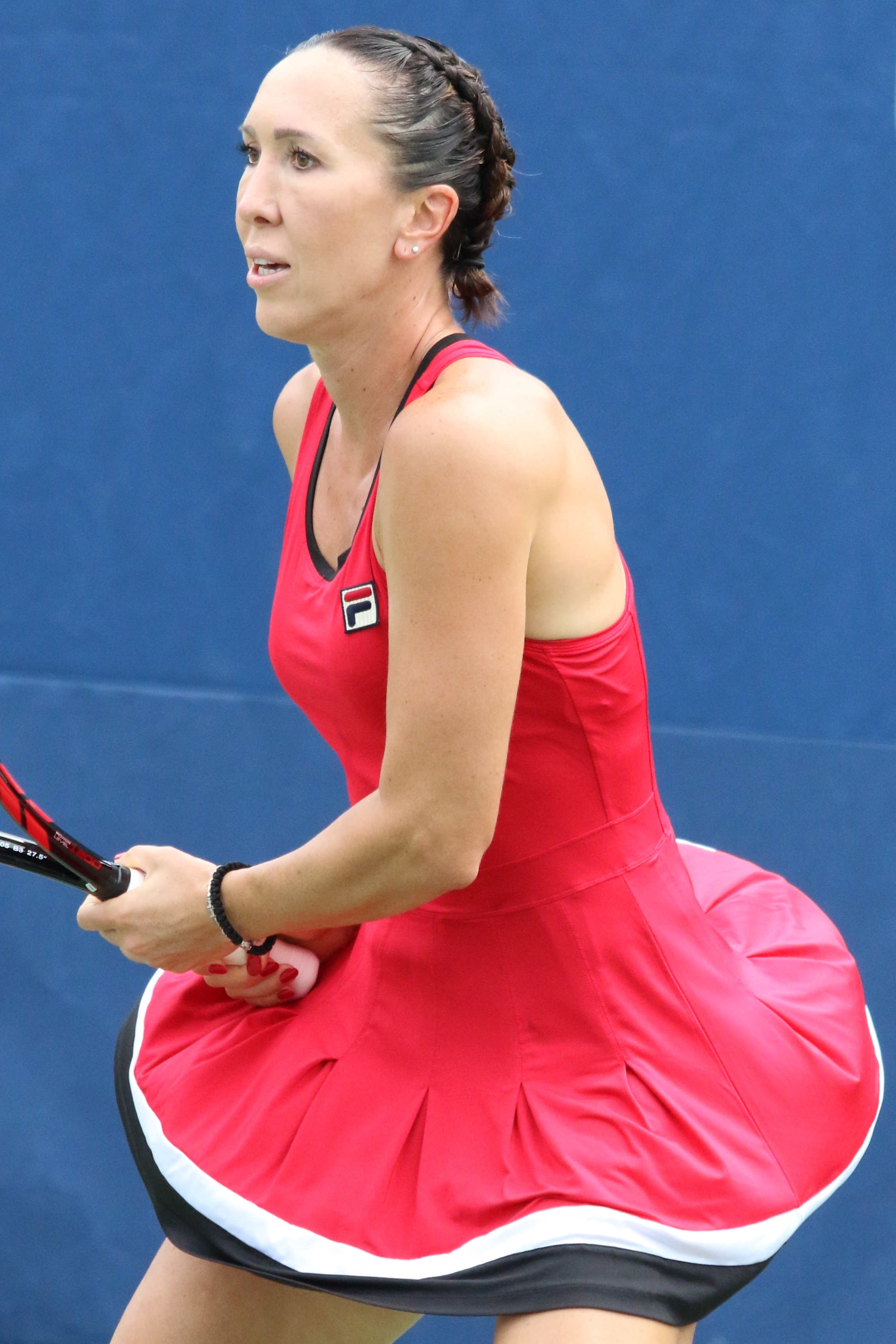 Jankovic US16 (15)